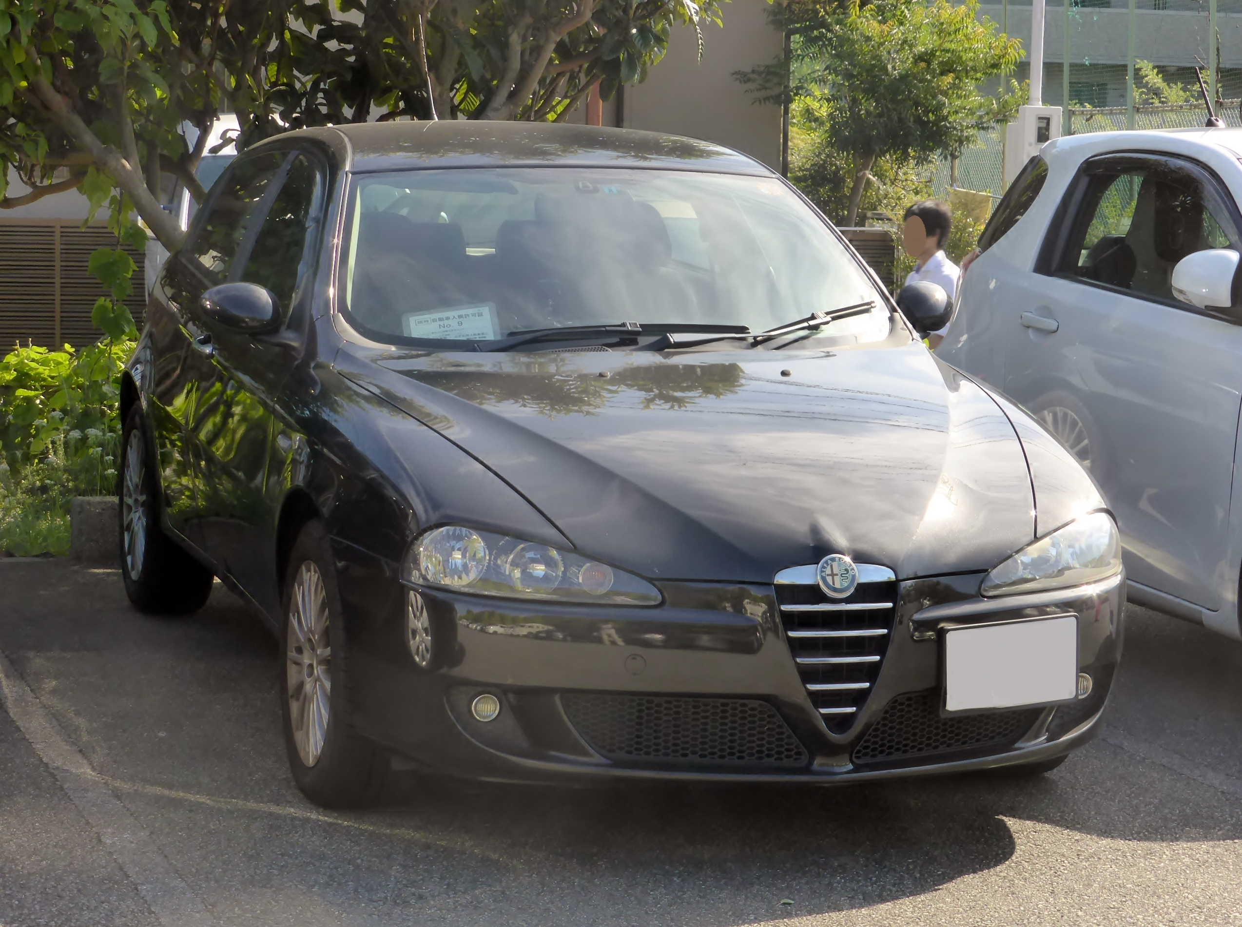 後期型アルファロメオ・147をフロントから撮影。